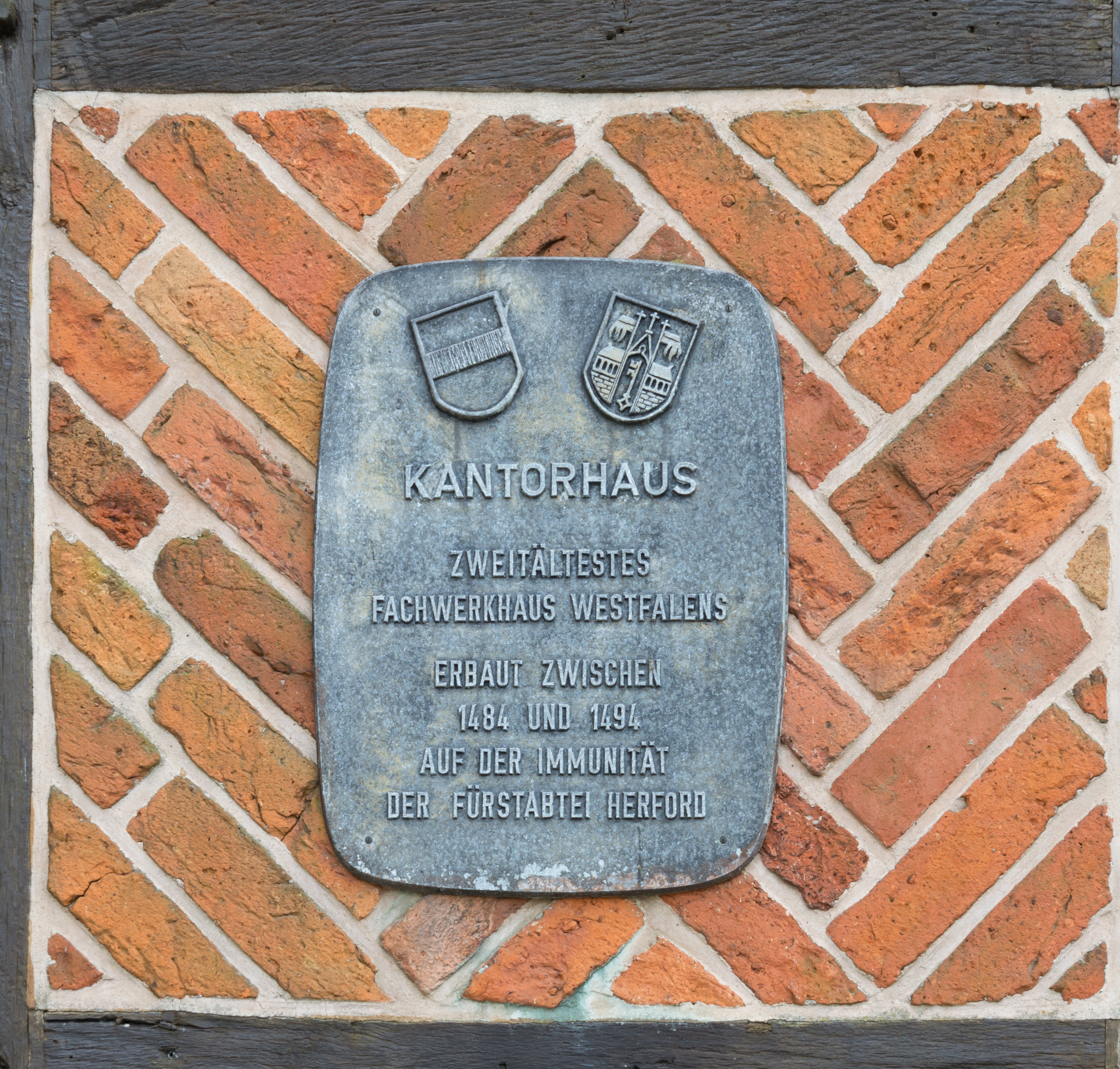 Kantorhaus, Herford This image shows a heritage building in Germany, located in the North Rhine-Westphalian city Herford (no. 8).